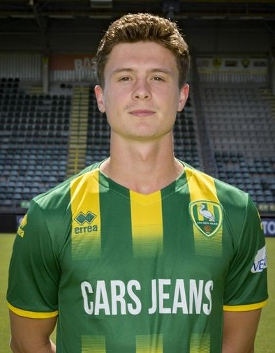 Bas Kuipers